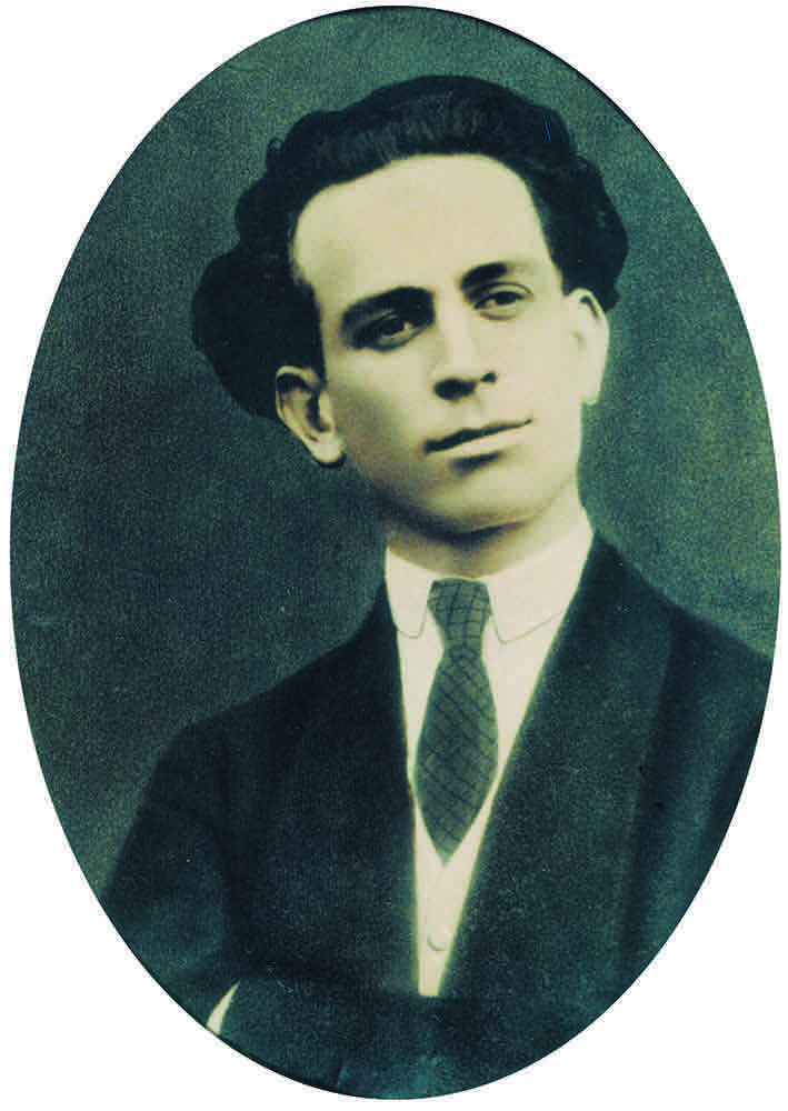 O compositor brasileiro Germano Benencase. (1897-1975)